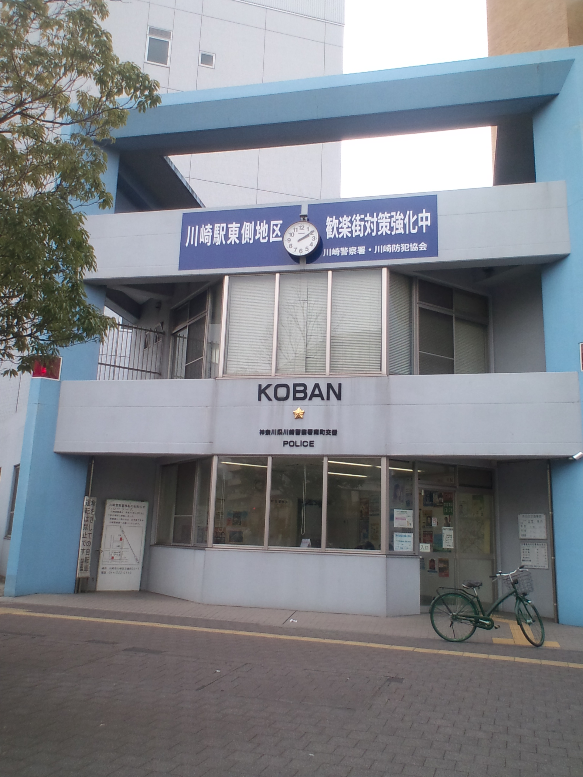 南町交番（神奈川県川崎市川崎区）